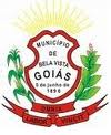 Brasão de Bela Vista de Goiás, Brasil.